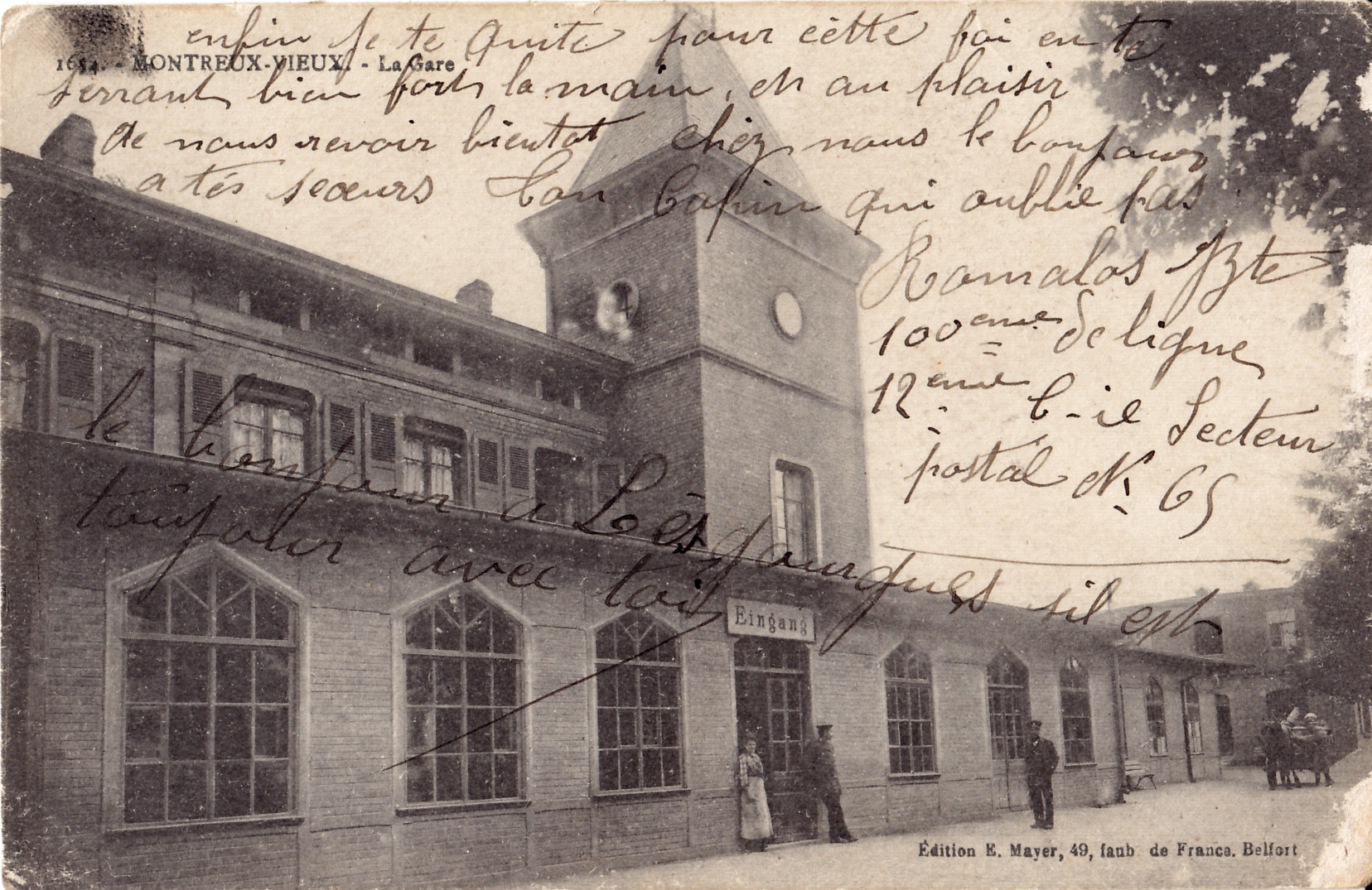 Carte postale ancienne éditée par E. Mayer à Belfort : MONTREUX-VIEUX - La Gare